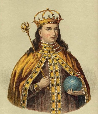 Princess Sophia Alekseyevna, regent at russian tsars Petr I and Ivan V in 1682—89. Illustration from book: Российский царственный дом Романовых. – СПб.: Издание Г.К. Фриденбурга, 1853.